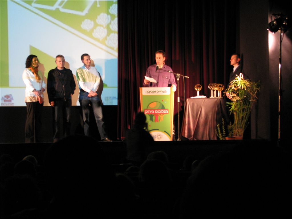 טקס הענקת פרס הגלובוס הירוק למטה המאבק להצלת עמק ססגון. הפרס ניתן על ידי חיים וסביבה" - ארגון הגג של ארגוני הסביבה בישראל, הכולל כ-130 ארגונים